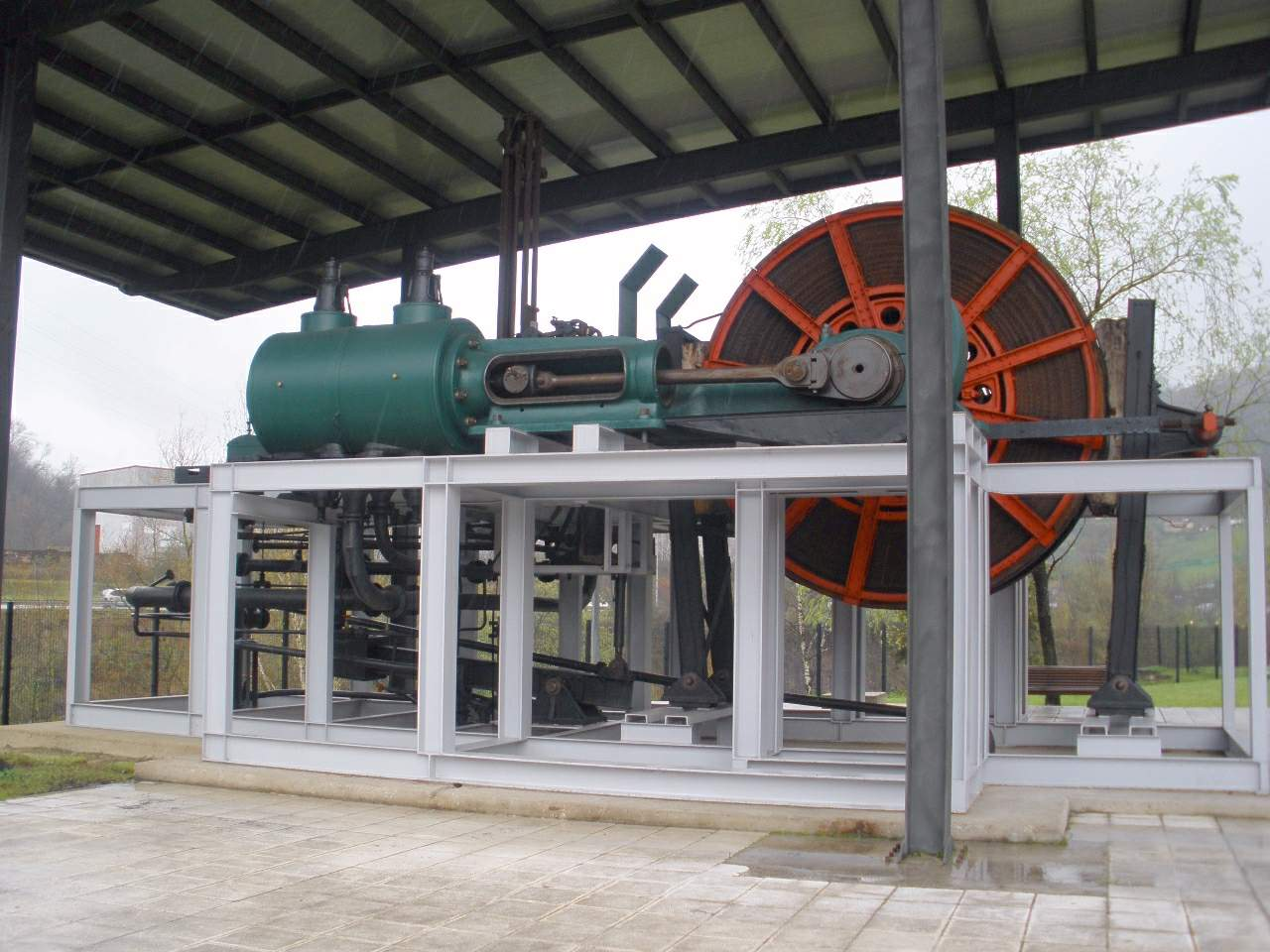 Antigua máquina de extracción de vapor y cable plano del pozo n.º 2 de Mina La Camocha (Gijón, Asturias) ahora en el Museo de la Minería y la Industria (MUMI), en El Entrego (San Martín del Rey Aurelio, Asturias)